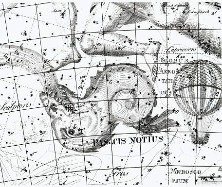 Piscis Austrinus